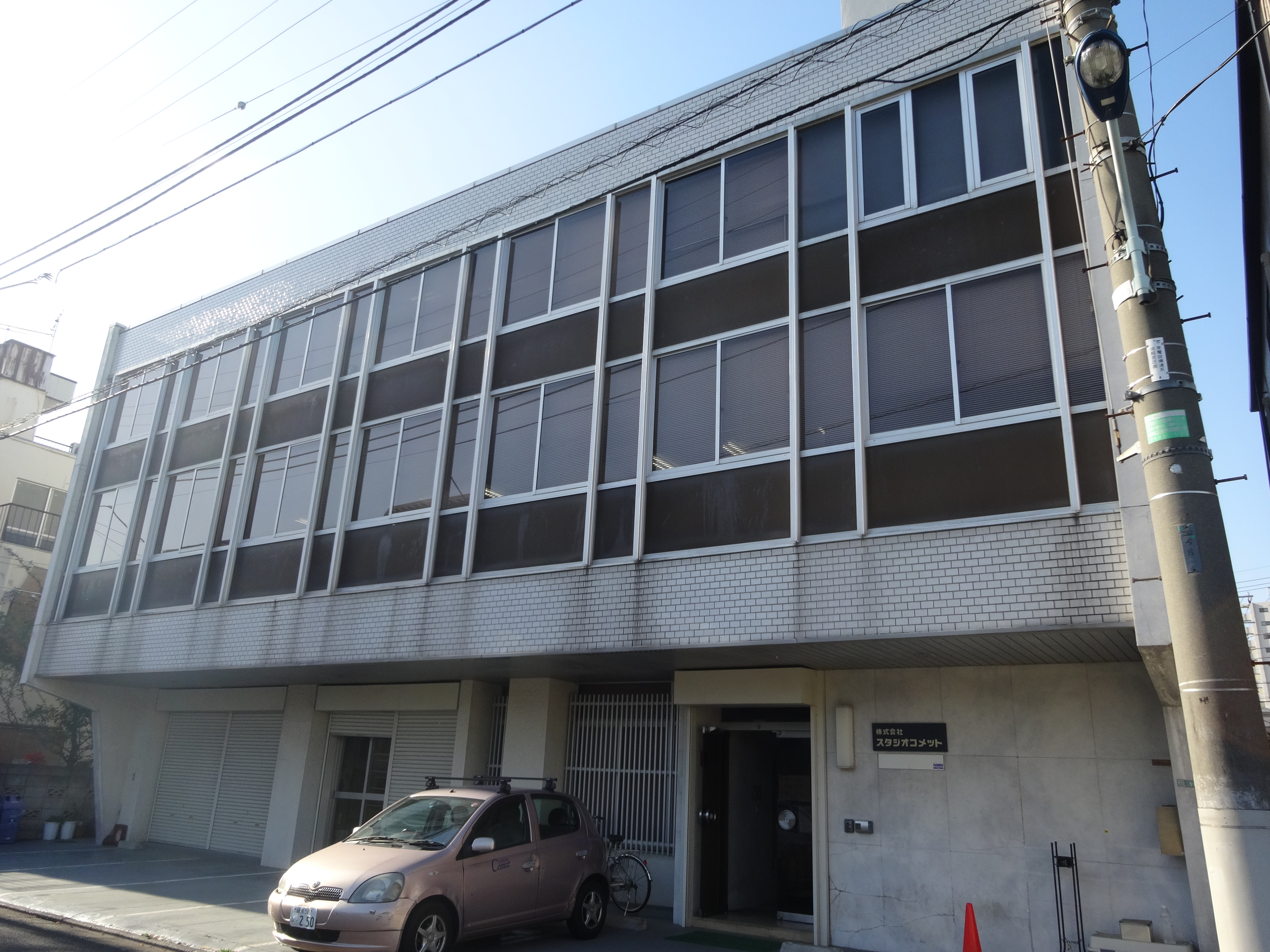 東京都練馬区豊玉中に所在するビル・NRMビル。アニメ制作会社・スタジオコメットが入居している。